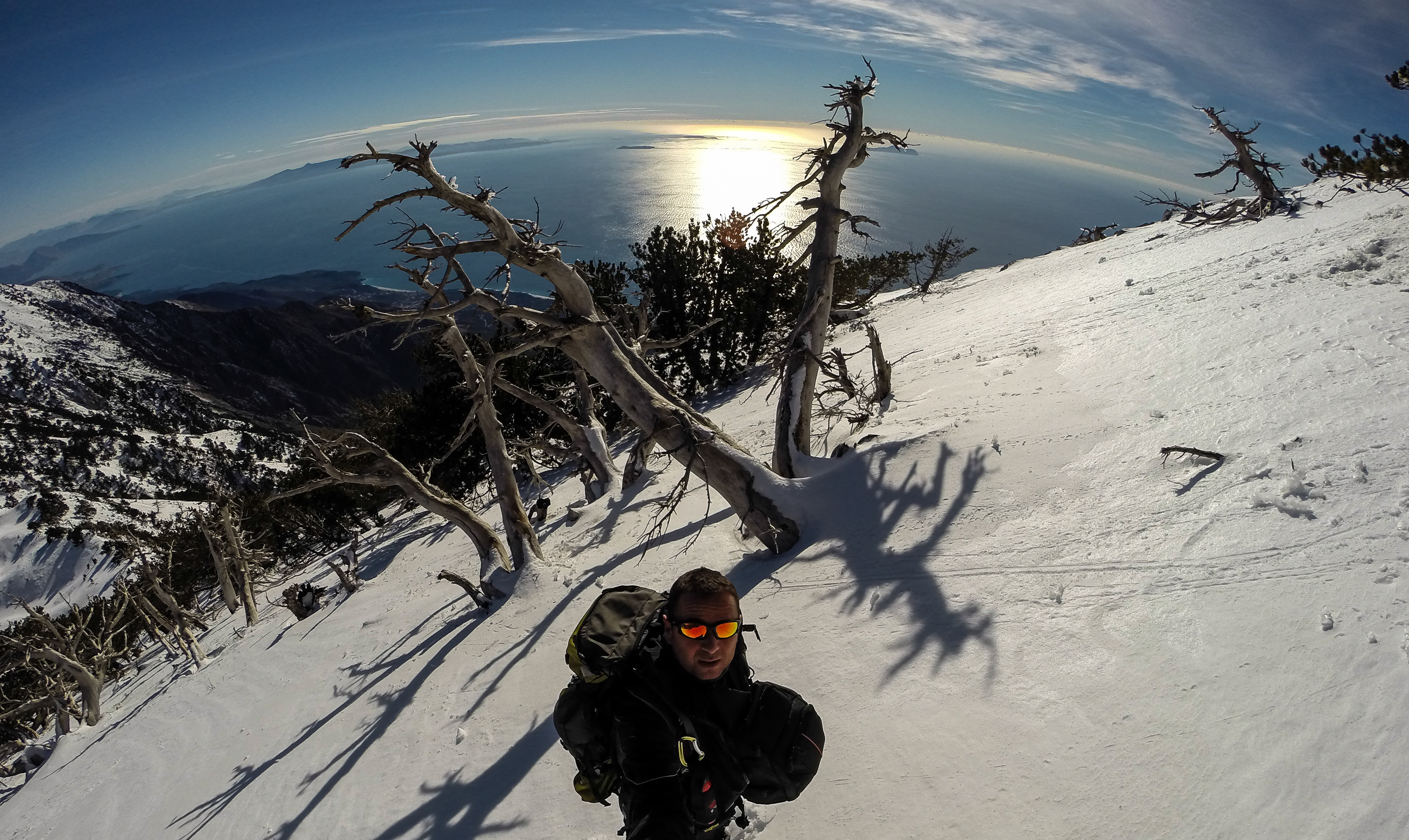 Llogara, Vlore Llogara